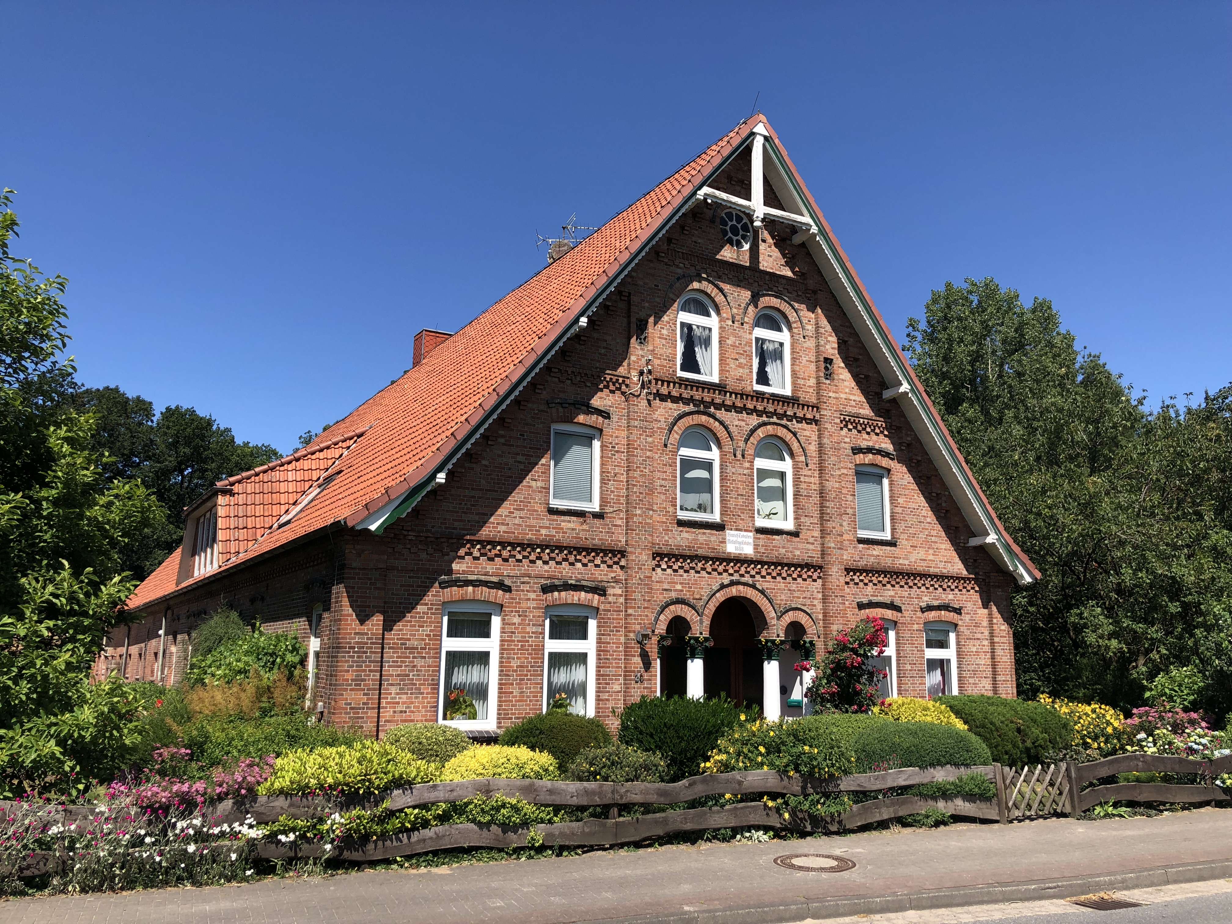 Buurnhuus in Remnoh